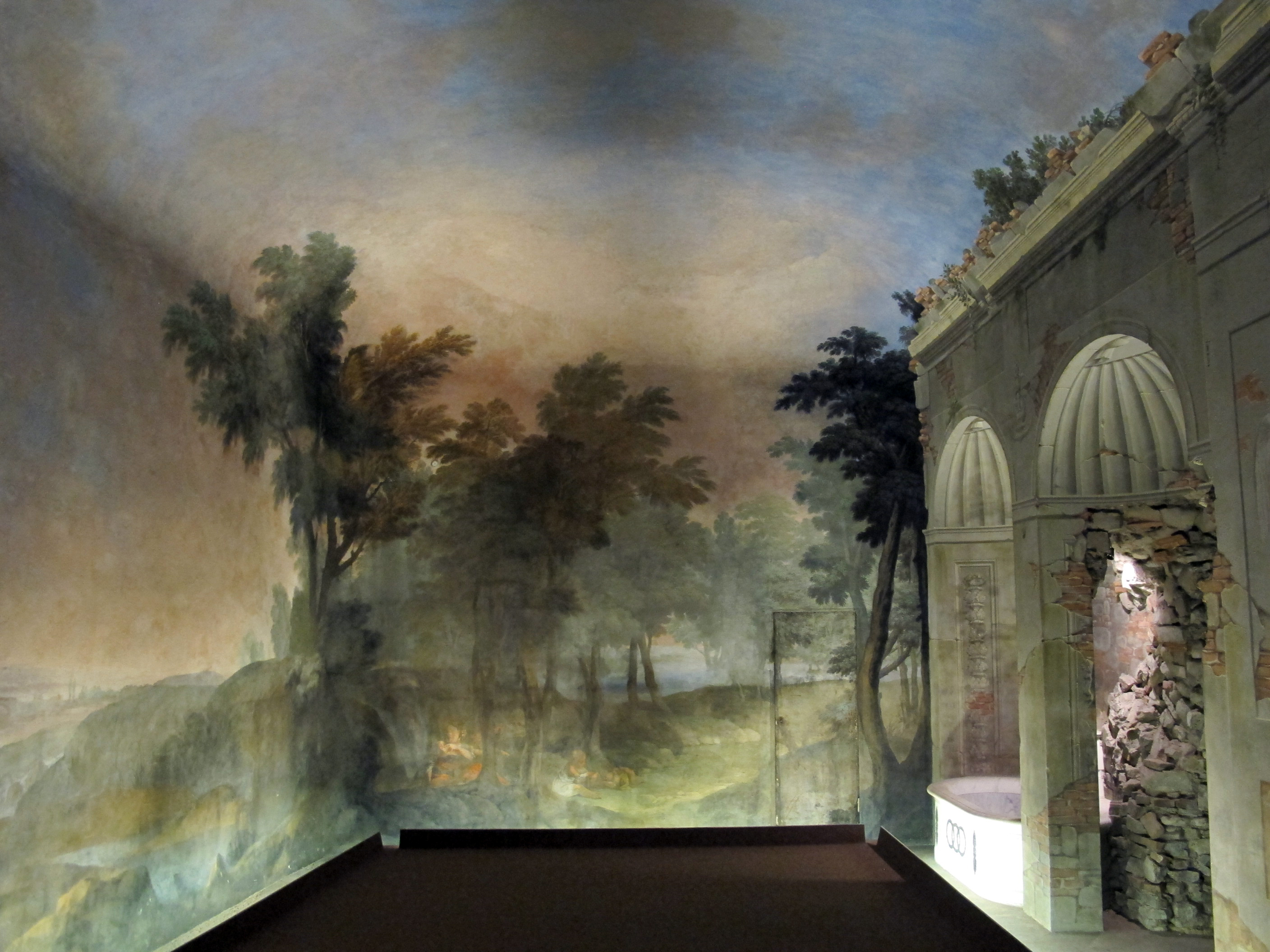 Museo di Casa Martelli - MIBAC This is a photo of a monument which is part of cultural heritage of Italy.